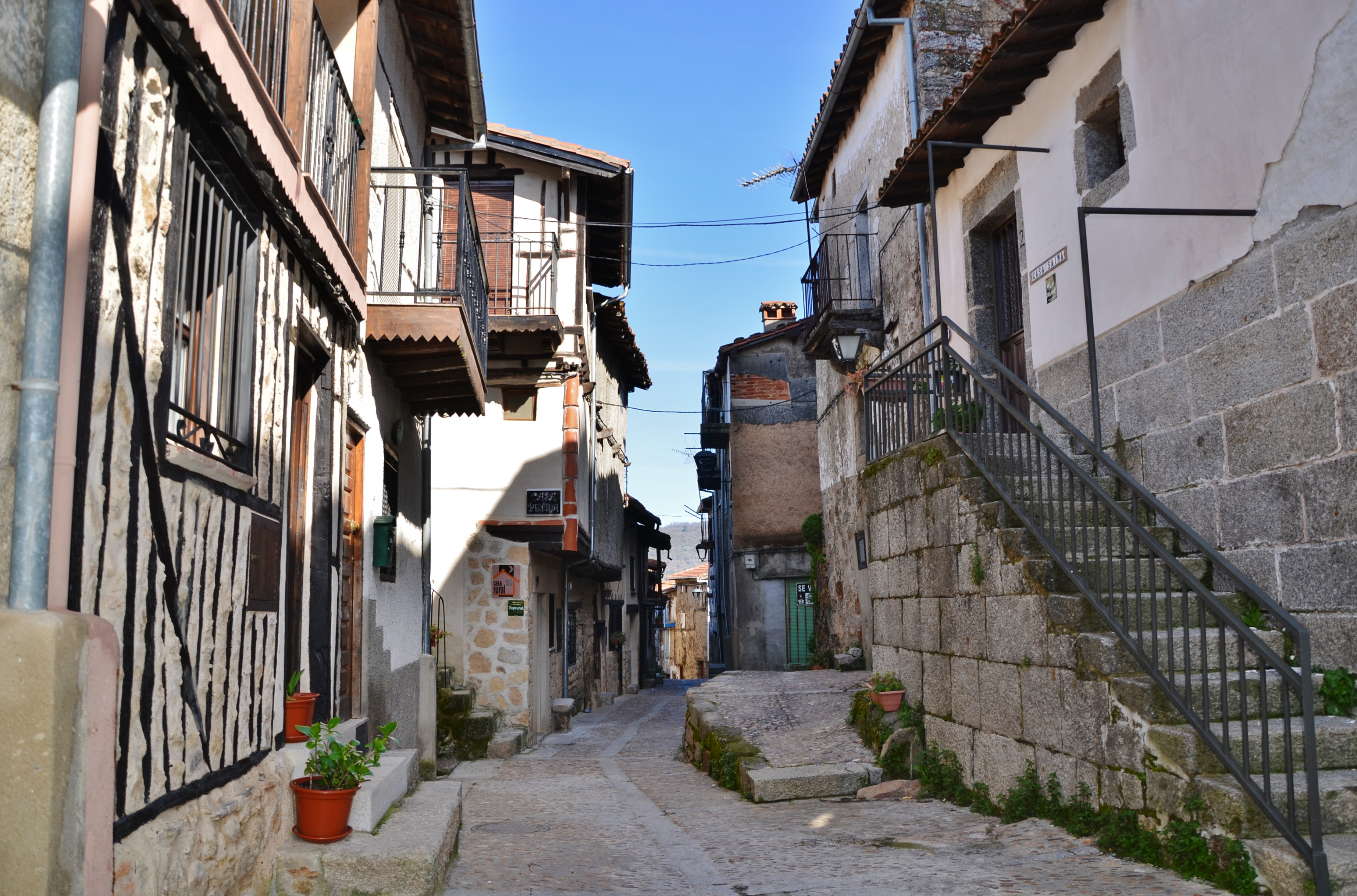 Miranda del Castañar, Salamanca